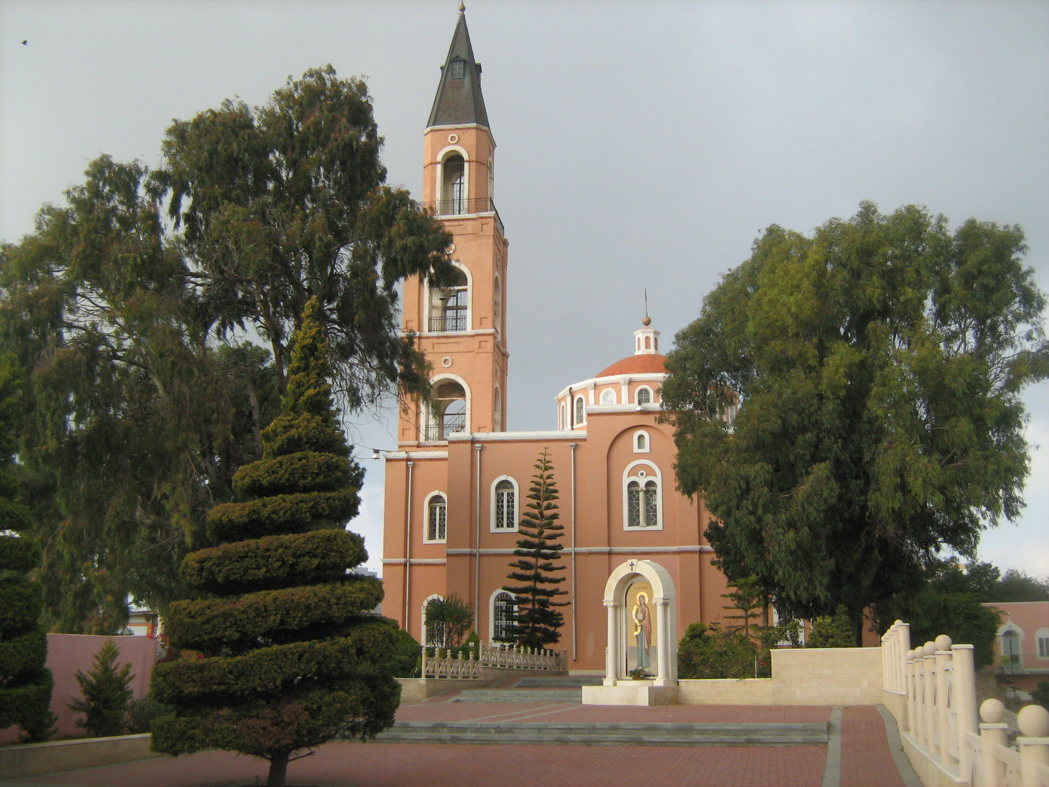 הכנסייה הפרבוסלבית אבו כביר